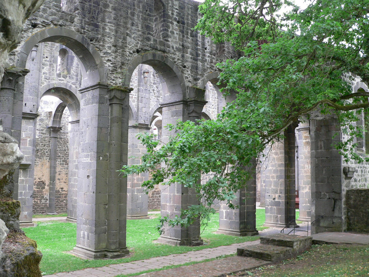 Haupt- und Seitenschiffe Kloster Arnsburg bei Lich, Hessen, Germany